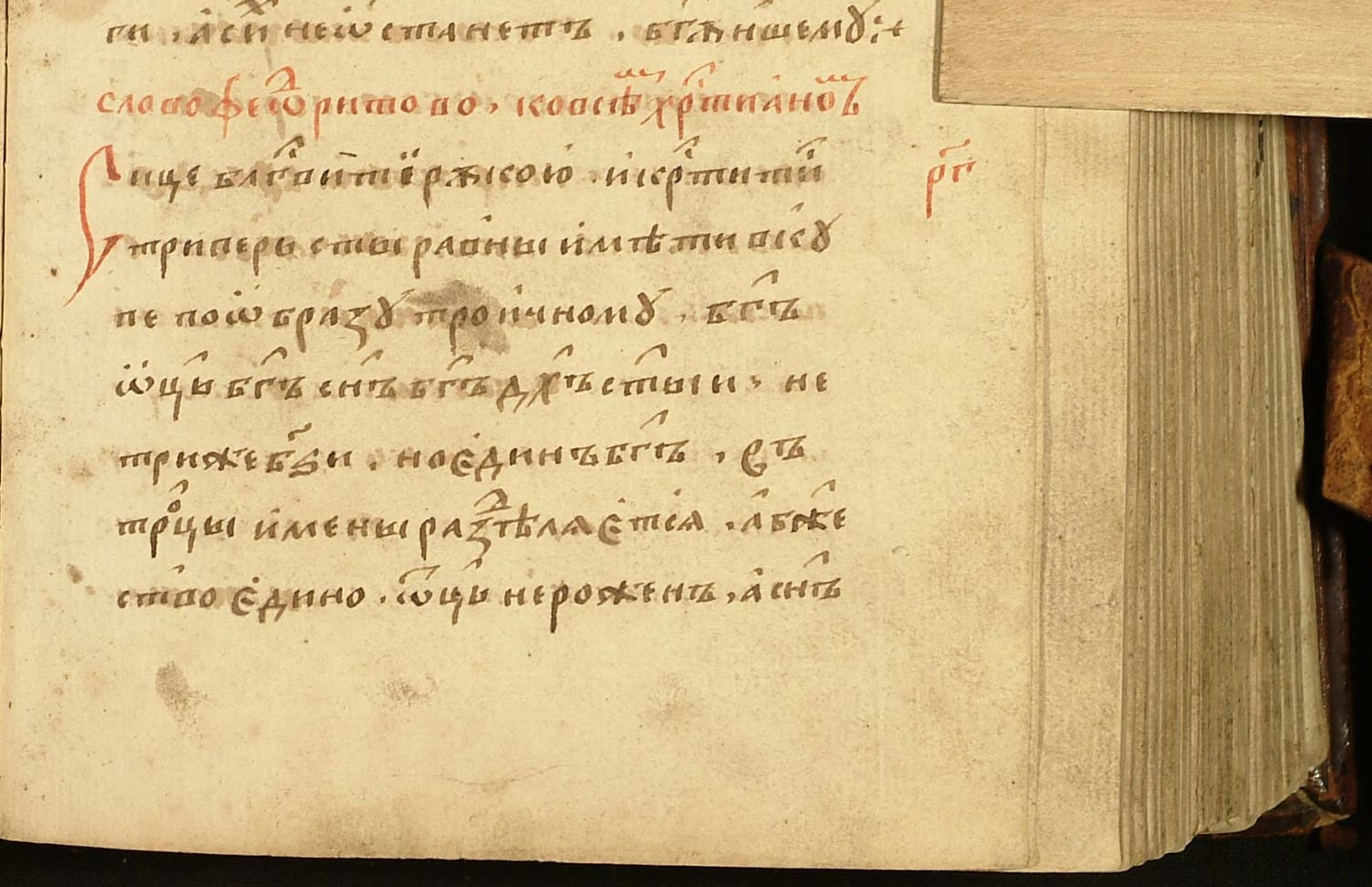 Слово Феодоритово Измарагд и Сборник 1582 год (Рукопись 794. (1899.) Измарагд и Сборник, полууст., ХVІ века, в четверть, 509 листов, первые ветхи лист 155)